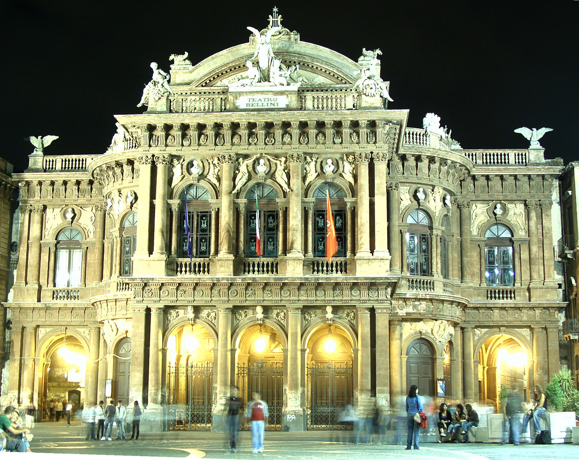 Vista serale della facciata del Teatro Massimo Vincenzo Bellini di Catania.